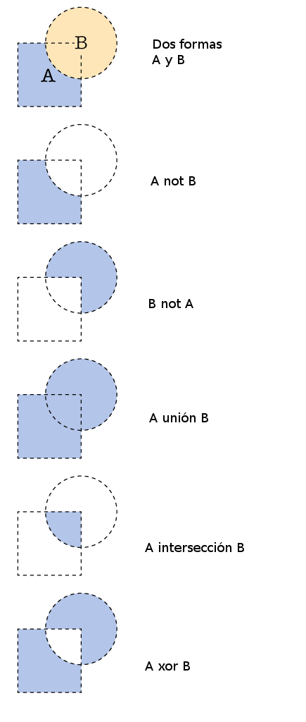 Ejemplos de operaciones booleanas sobre polígonos. Basado en File:Boolean operations on shapes.png